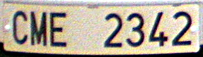 Cotxe dels Mossos d'Esquadra a l'Avinguda Llibertat de Mollet del Vallès.